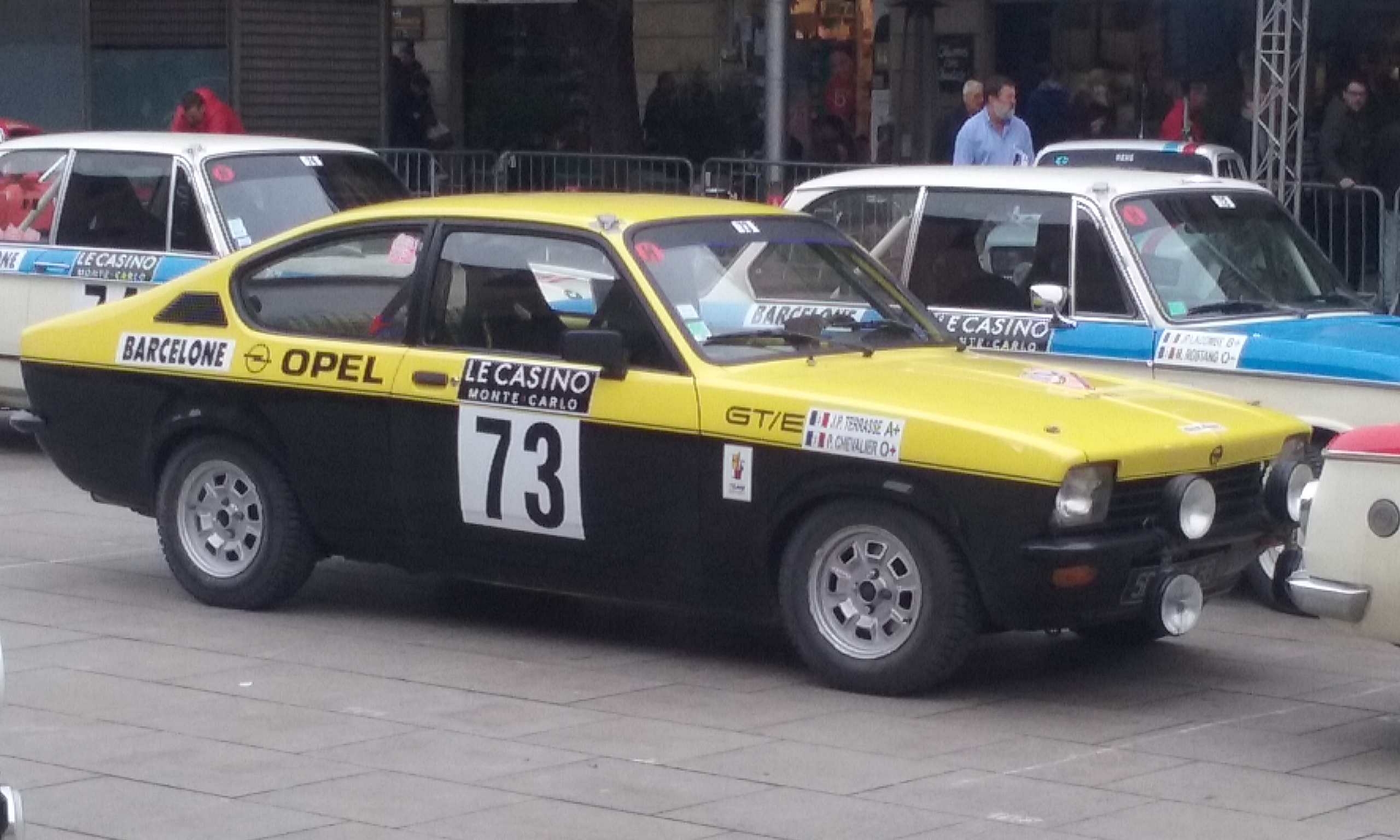 Opel Kadett GTE a la Sortida del Rallye Monte-Carlo Historique 2016 des de Barcelona